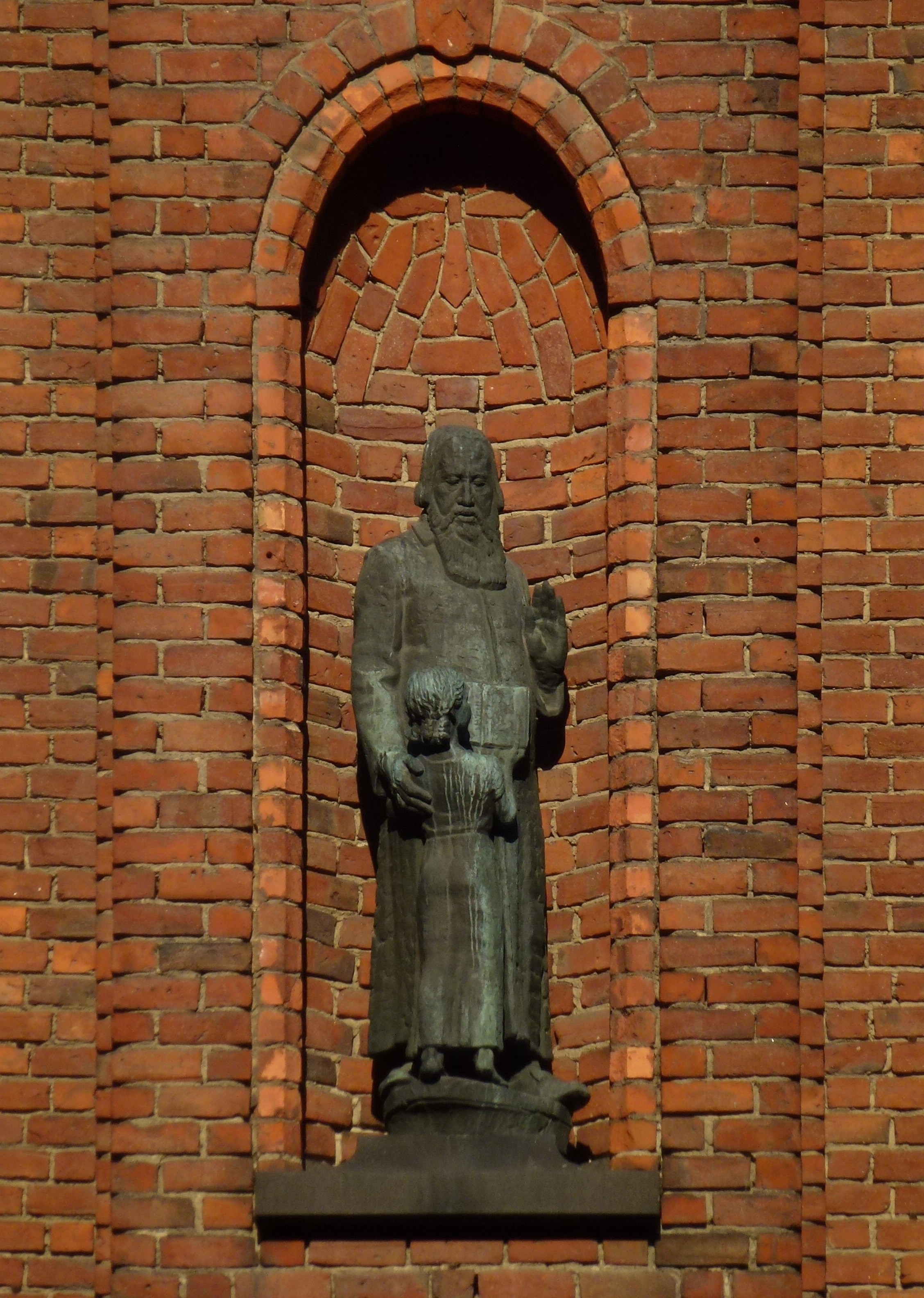 Stadshuset fasad mittpartiet med skulpturer av Ansgar Almquist: Johannes Rudbeckius